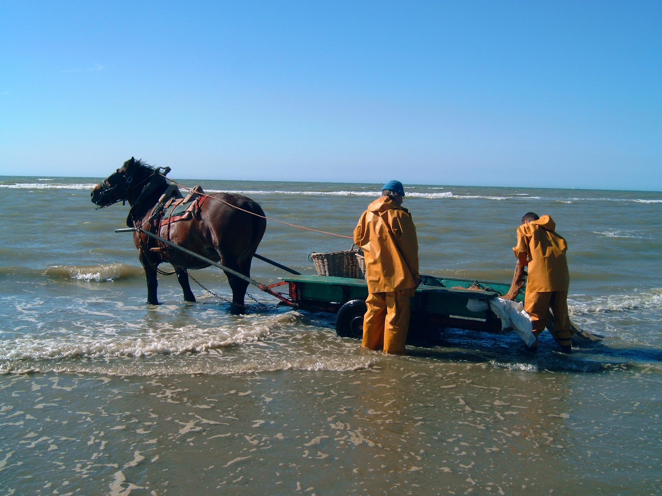 Garnelenfischen in Oostduinkerke